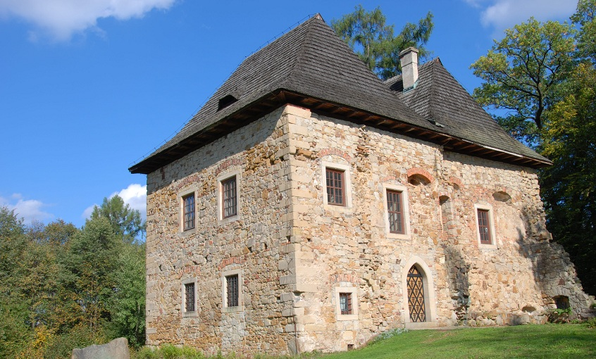 zespół dworski, 1531, XIX/XX w.: dwór obronny park teren folwarku Wieruszyce, Łapanów